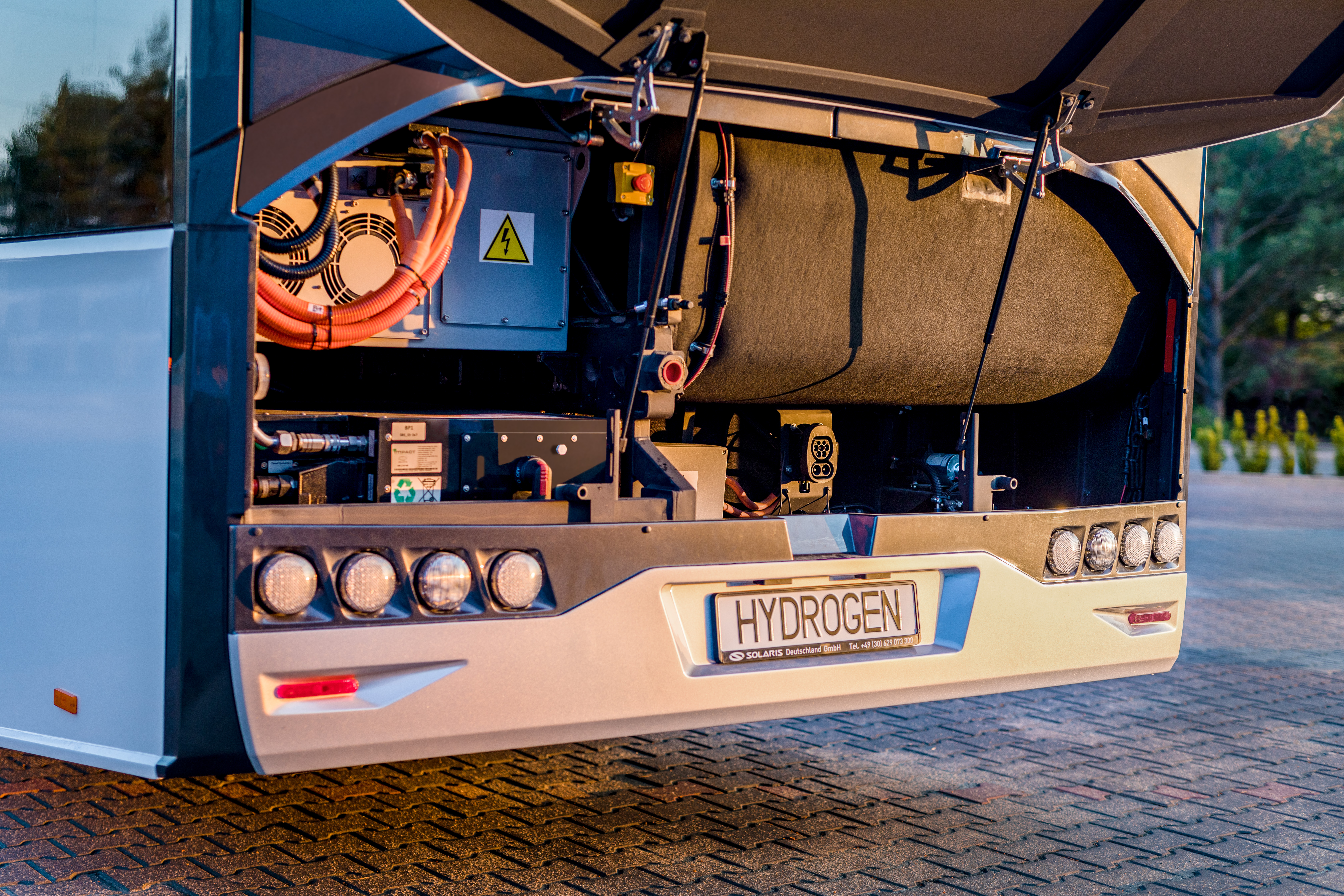 Solaris Urbino 12 hydrogen